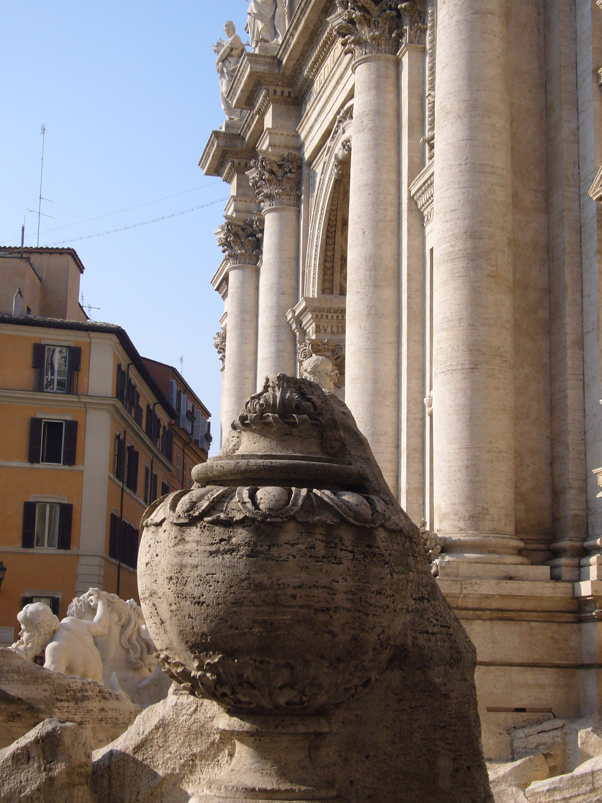 Roma, fontana di Trevi: l'Asso di Coppe